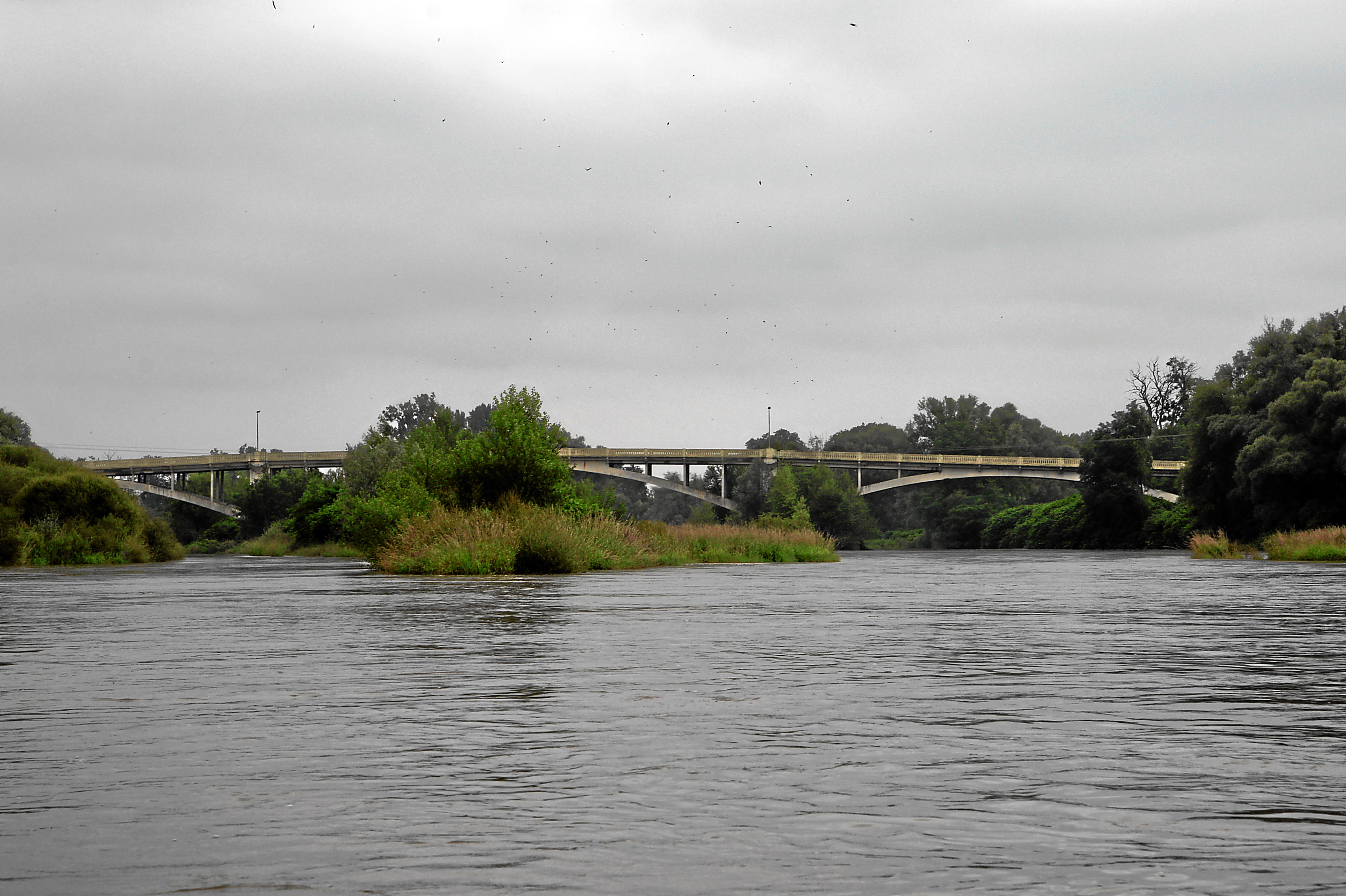 Pouilly-sous-Charlieu: Brücke der D4 (Blick zurück)